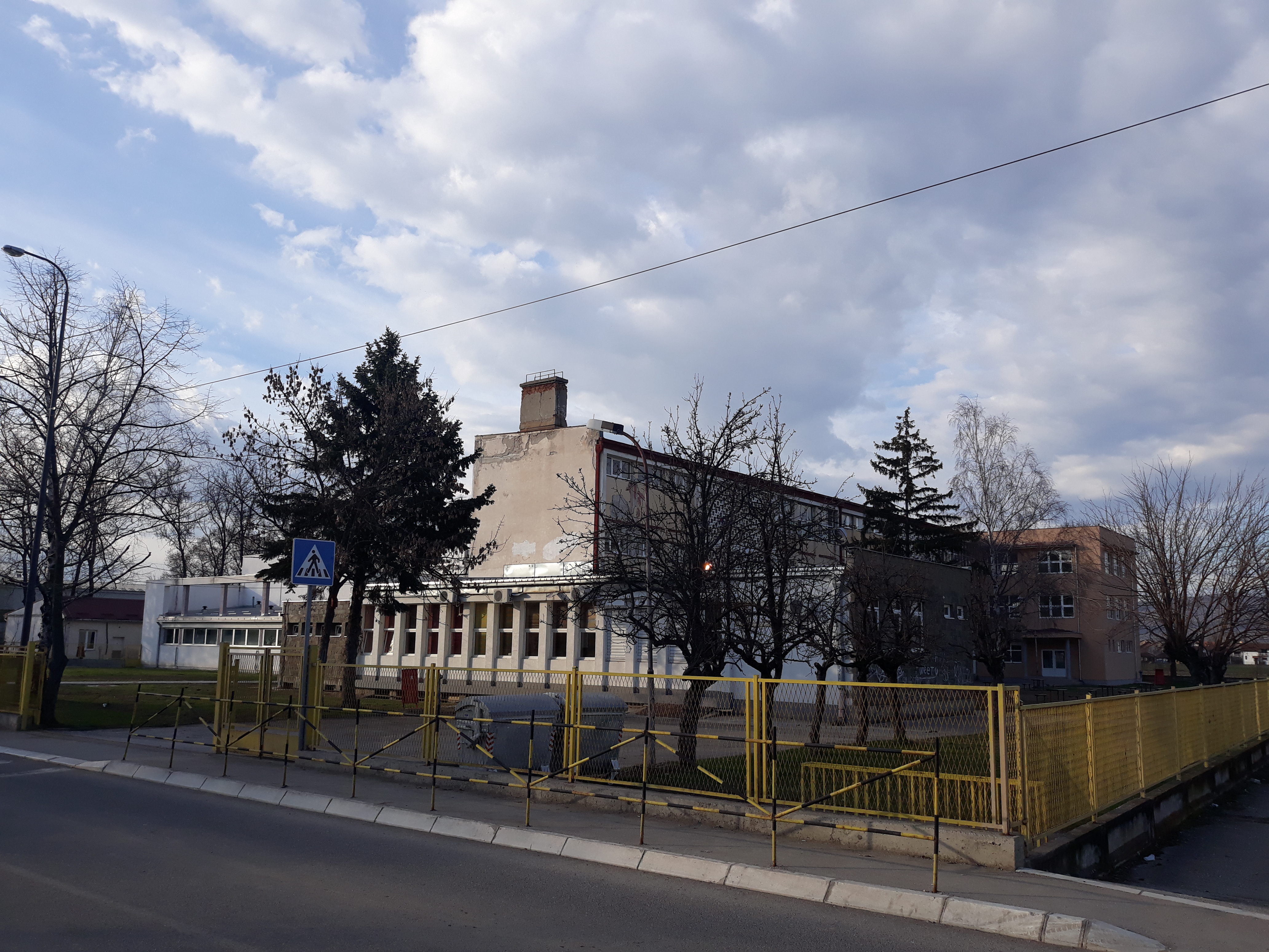 Основна школа „Браћа Вилотијевић позиционирана на Ратарском имању у Краљеву“.